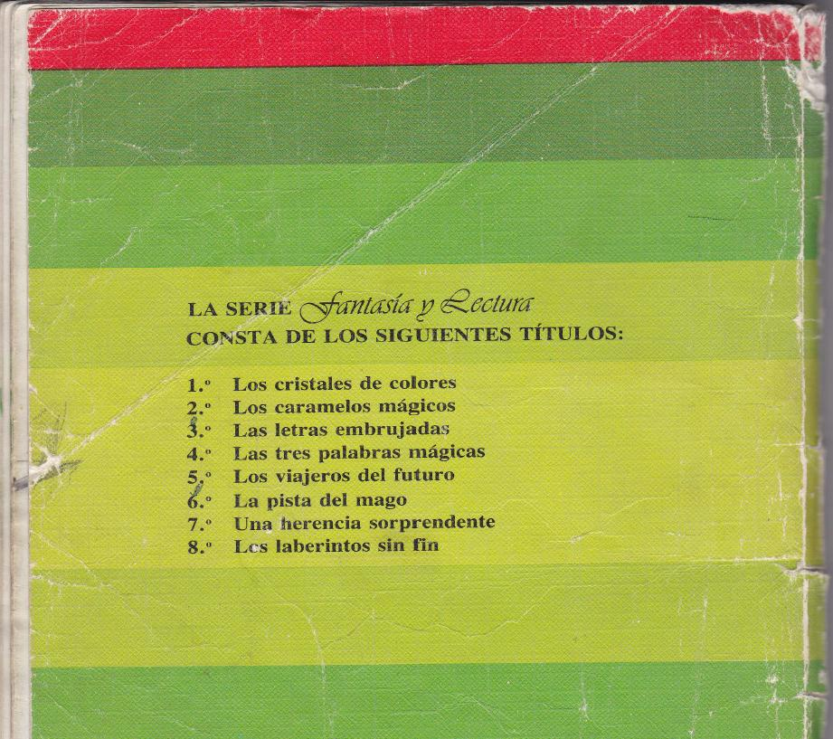 Fotografía que muestra la lista de 8 títulos que aparece en la contraportada del primer volumen: "Los cristales de colores"